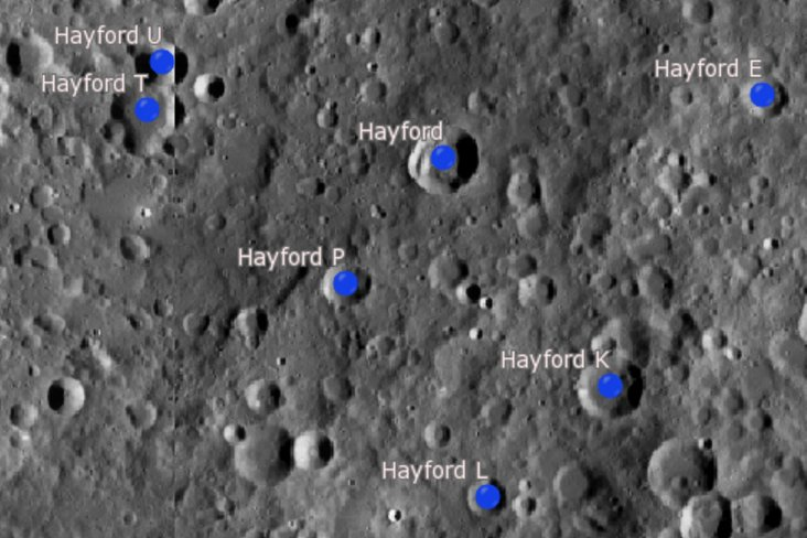 Cráter lunar Hayford. Cráteres satélite. (Imagen LRO)